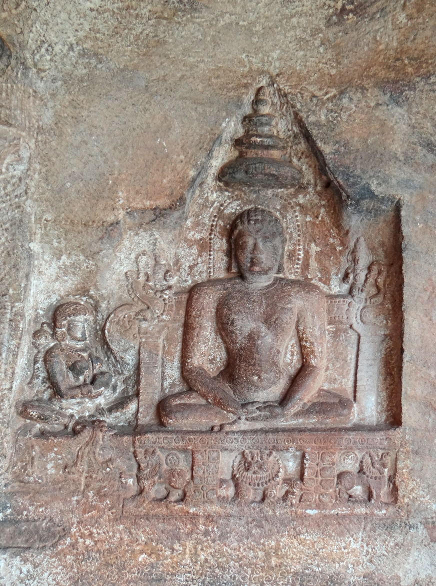 Mahavira, le 24ème et dernier Tîrthankara (prophète jaïn), représenté sur une paroi du temple troglodytique de culte jaïn (grottes de Badami) Ce temple, creusé dans le rocher, est un sanctuaire jaïn. Il est postérieur aux trois autres temples qui sont hindouistes et date de la fin du VIè ou du début du VIIè siècle. Wikipedia sur Badami